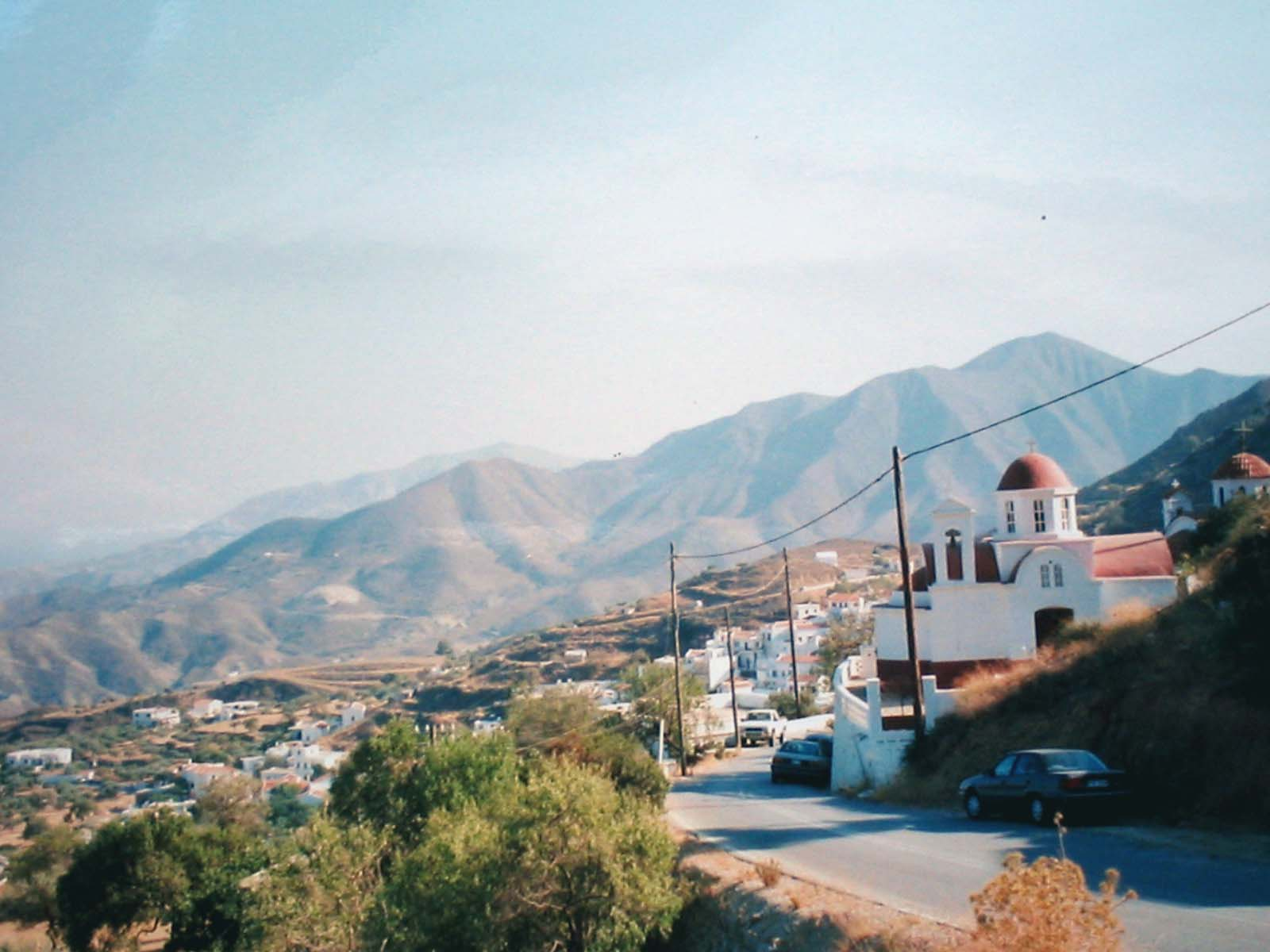 Karpathos uitzicht, zelf gemaakte foto 1997